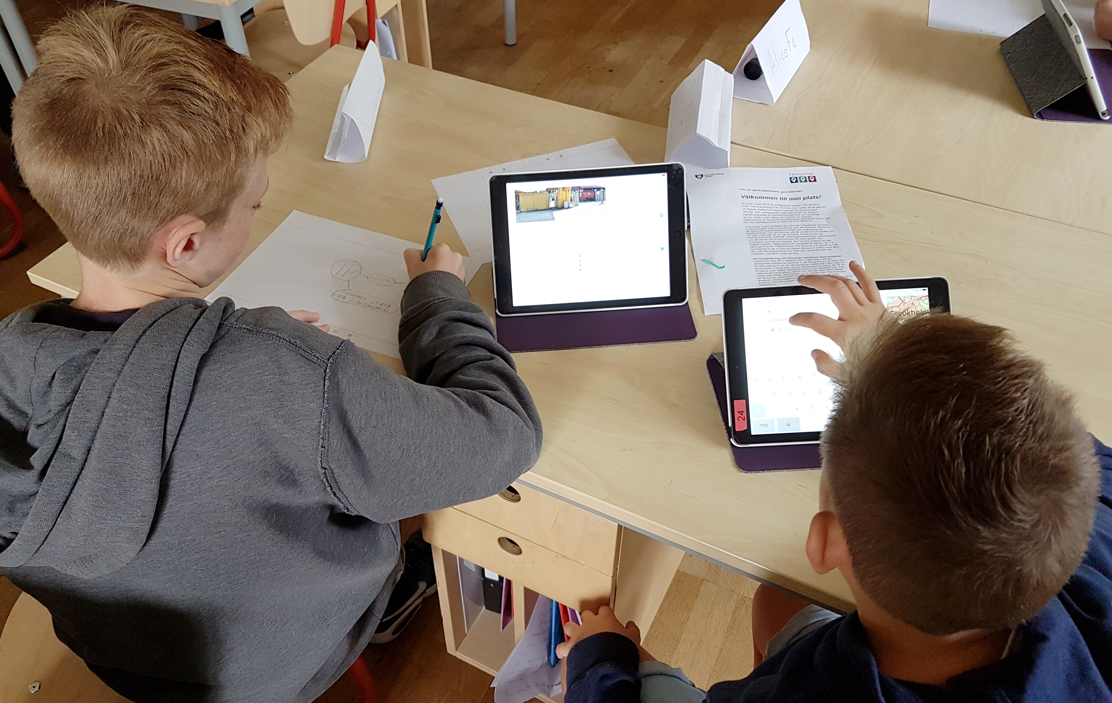 Lektion i Enskede skola.